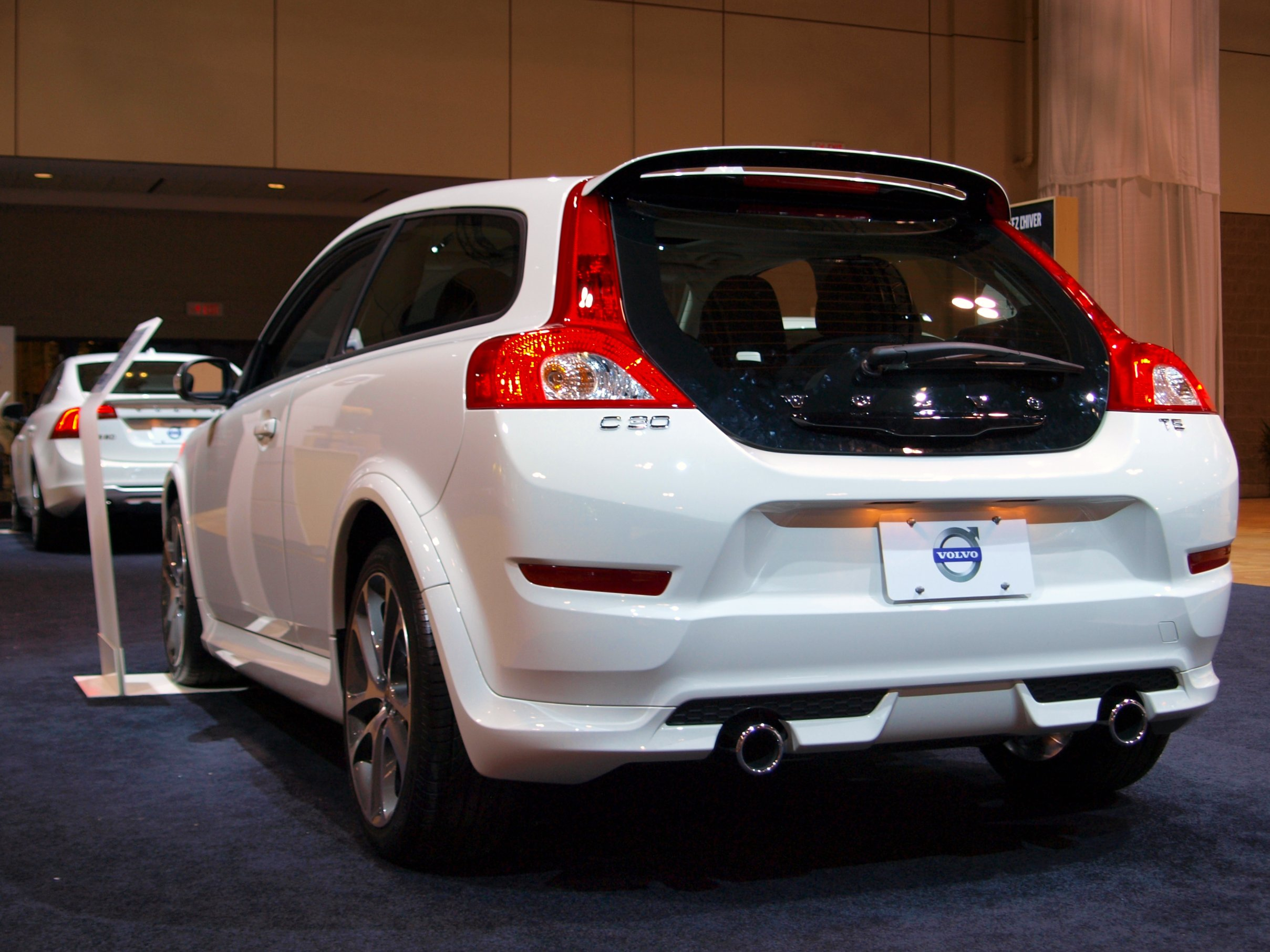 2011 Volvo C30